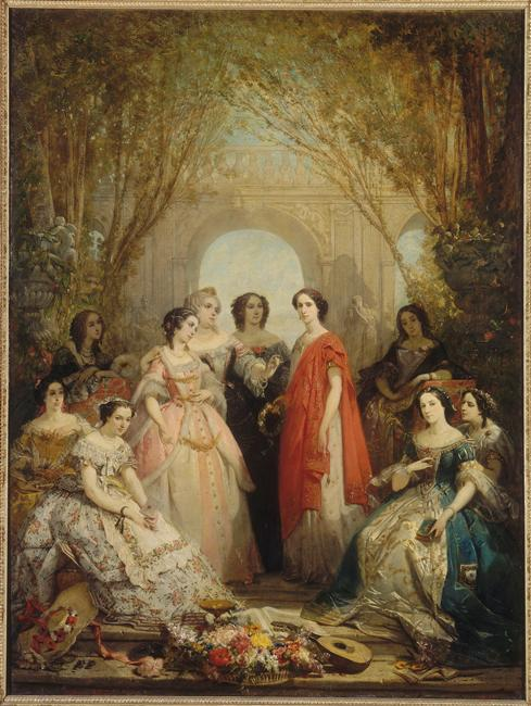 Les Dames sociétaires de la Comédie-Française en 1855, huile sur toile par Faustin Besson, peinte en 1855 (château de Versailles). Représentées dans les costumes de leurs rôles, sont portraiturées : Julie Bernat, dite Mlle Judith ; Louise Marquet ; Augustine Brohan ; Delphine-Eléonore Fix ; Louise Despreaux-Allan ; Pauline Mesnage, dite Mlle Denain ; Élisabeth Félix, dite Mlle Rachel ; Jeanne Plessy ; Madeleine Brohan ; Pierrette-Maria Pignaud, dite Mlle Favard.